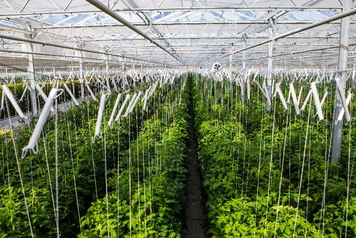 Kietaviškių gausa, UAB šiltnamyje augančios daržovės